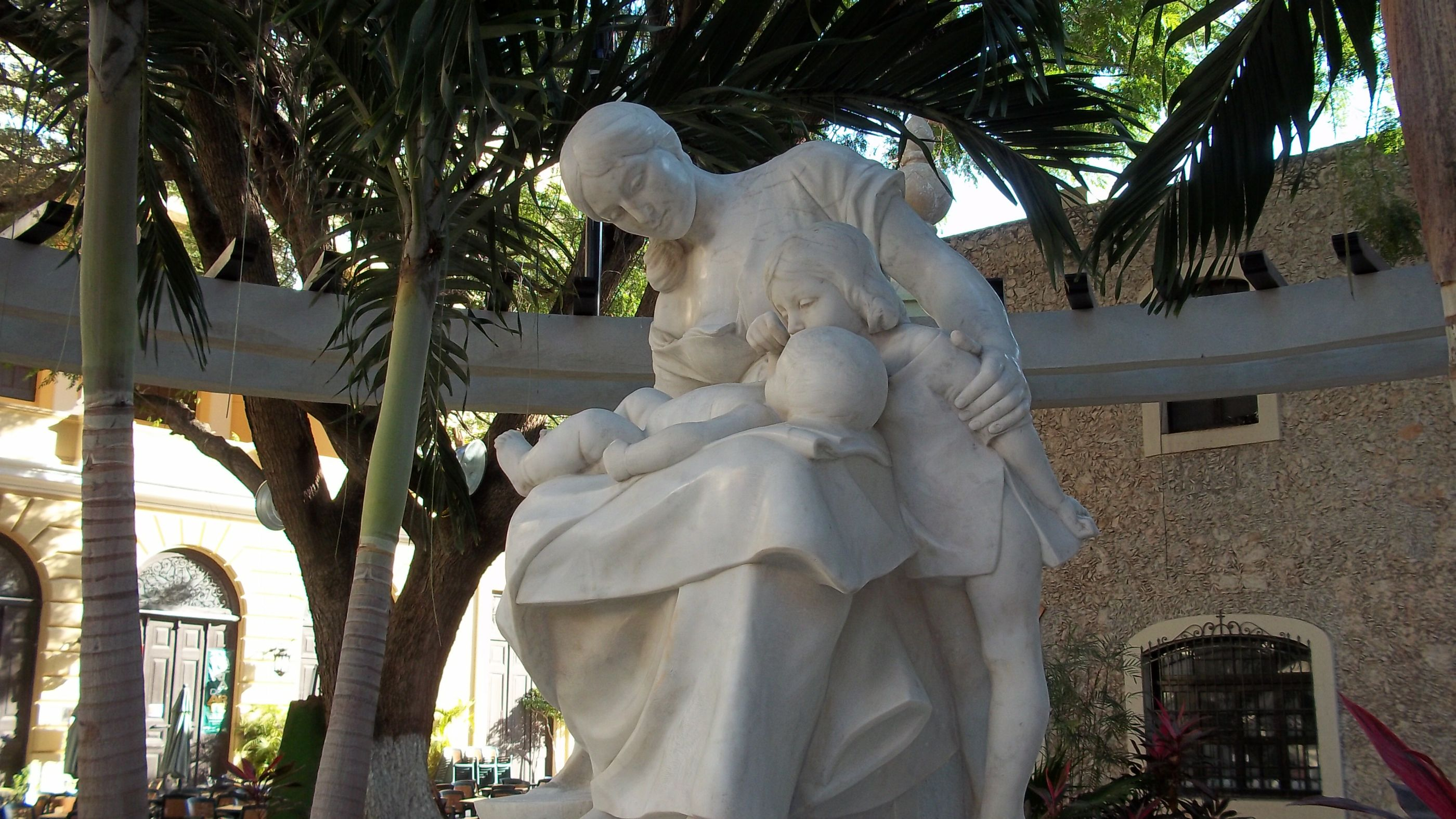 En Mérida, Yucatán, México el 1 de enero de 2012. El monumento se encuentra junto a la iglesia del Jesús.